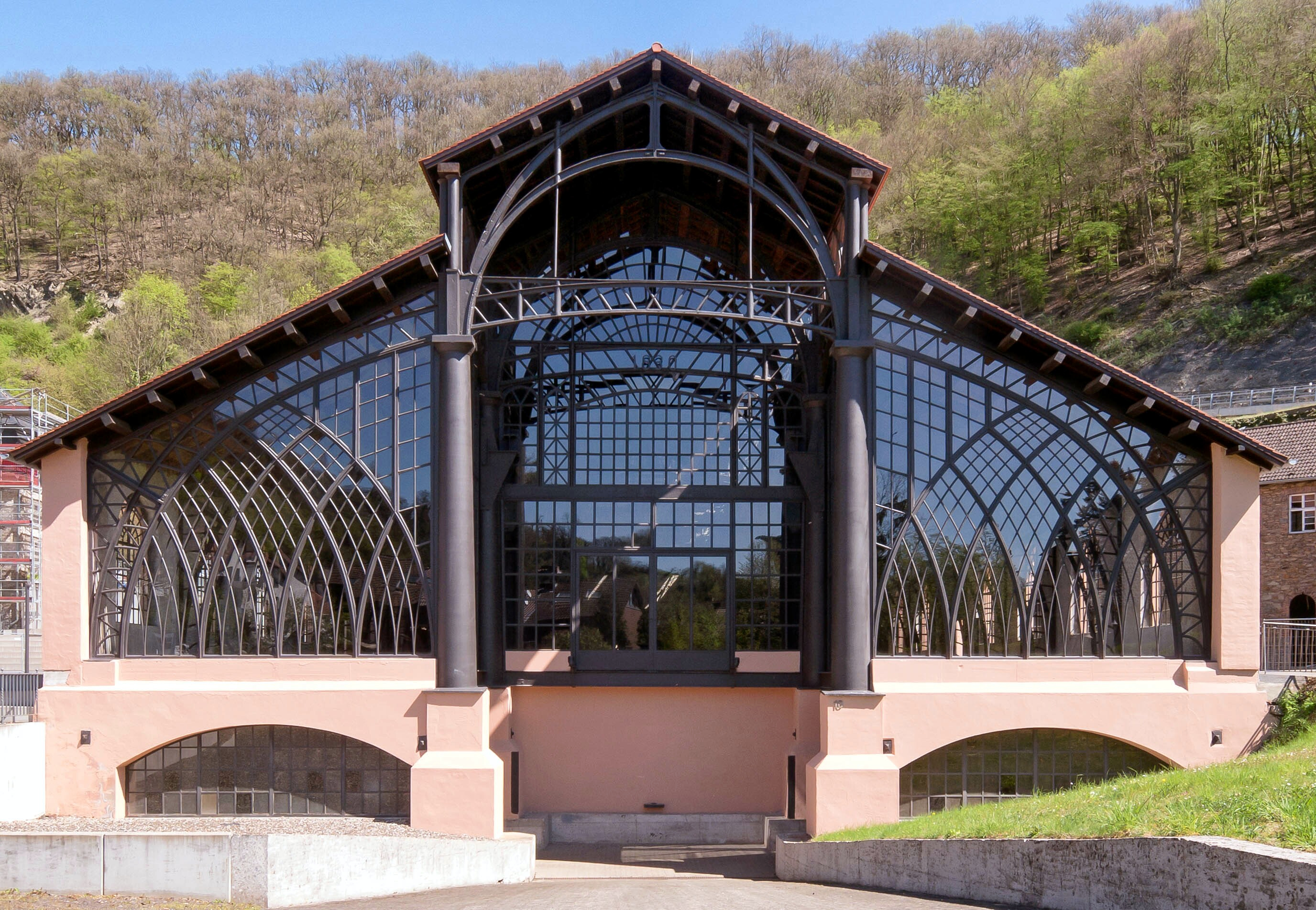 Die Gießhalle entstand 1828-1830 nach dem Vorbild einer Kathedrale in Form einer dreischiffigen Basilika.